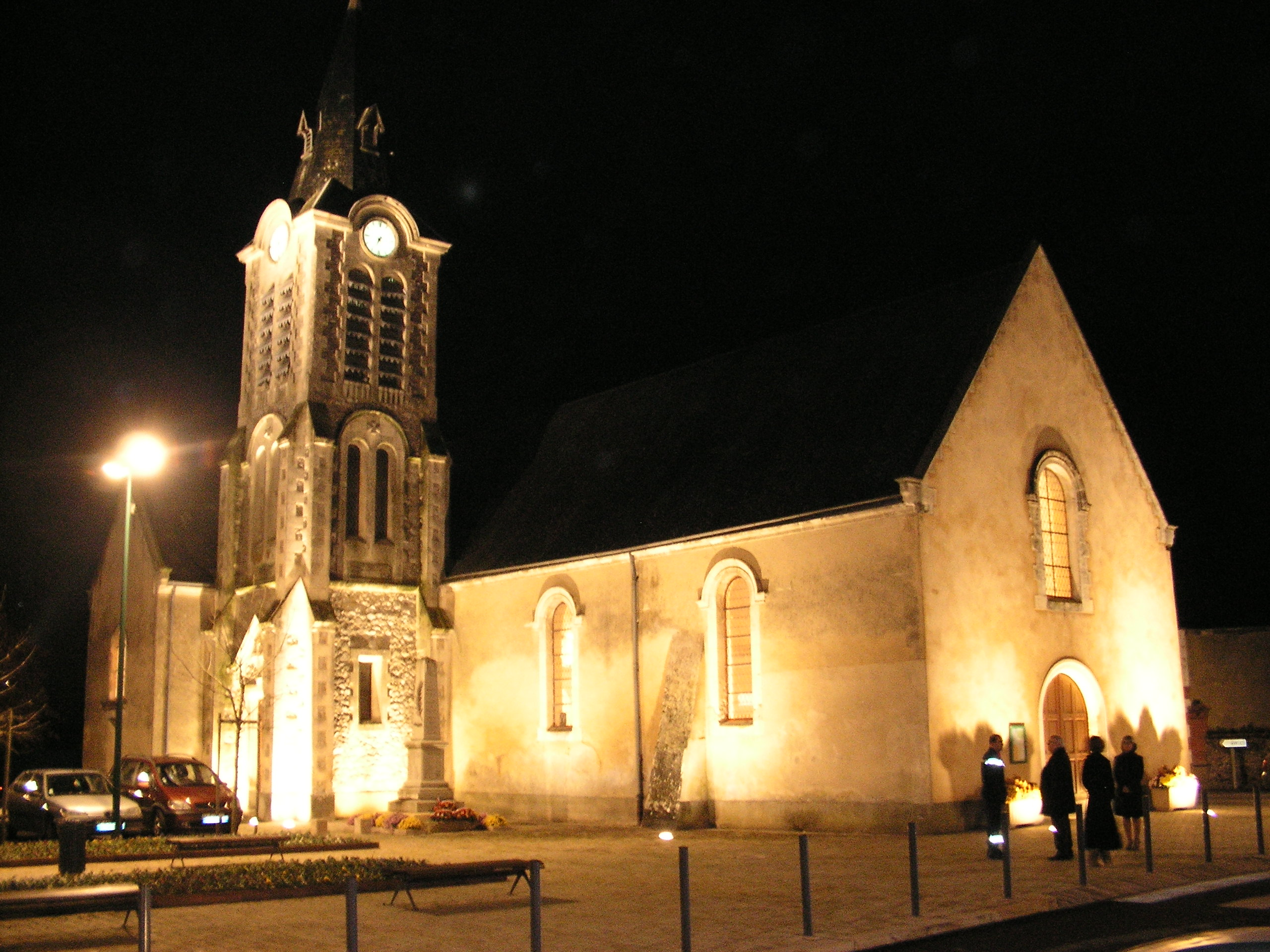 église de mézeray (72)